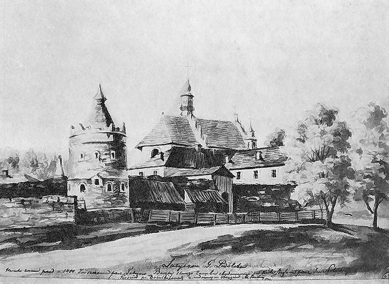 Baszta i mury zamku Potockich, kościół parafialny podominikański p.w. Wniebowzięcia NMP i klasztor. Widok murów obronnych z cylindryczną basztą od strony drogi; w głębi kościół z sygnaturką i zabudowania klasztorne. Napis: Latyczów G. Podolska; Miasto znane przed r. 1400. Zniszczone przez Tatarów. Baszta starego Zamku zbudowanego za Króla Stefana przez Jana Potockiego r. 1607. Kościół po Dominikanach z cudownym obrazem MBoskiej; napis na podkładzie: G. Podolska Latyczów, resztki zamku i koś. po-Dominikański. 1871-1873. Rys. ołówkiem podmalowany sepią. 20,1 x 28,8 cm. Muzeum Narodowe, Kraków. III-r.a. 2991. (Teka Podole).